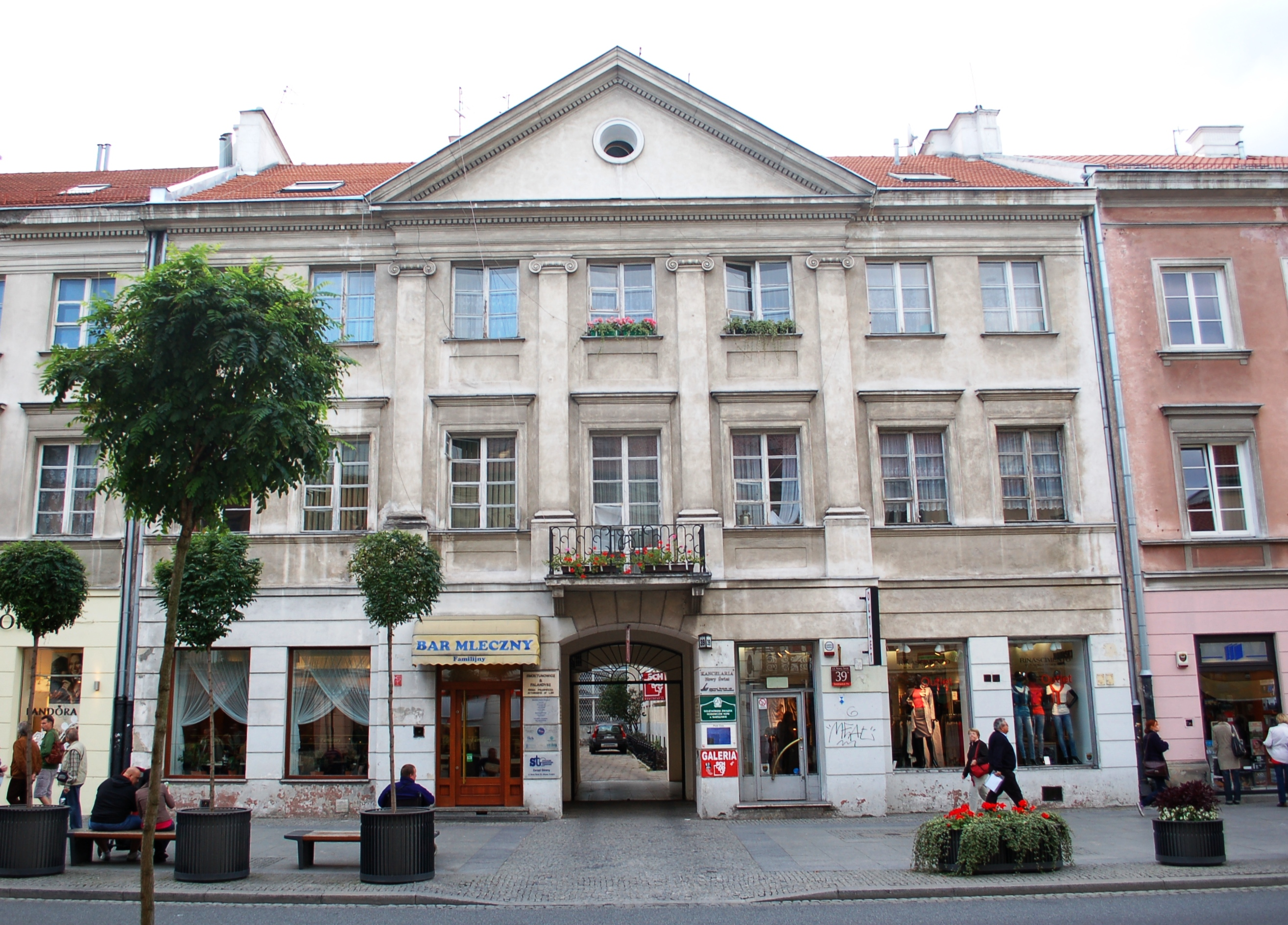 Warschau, Nowy Swiat